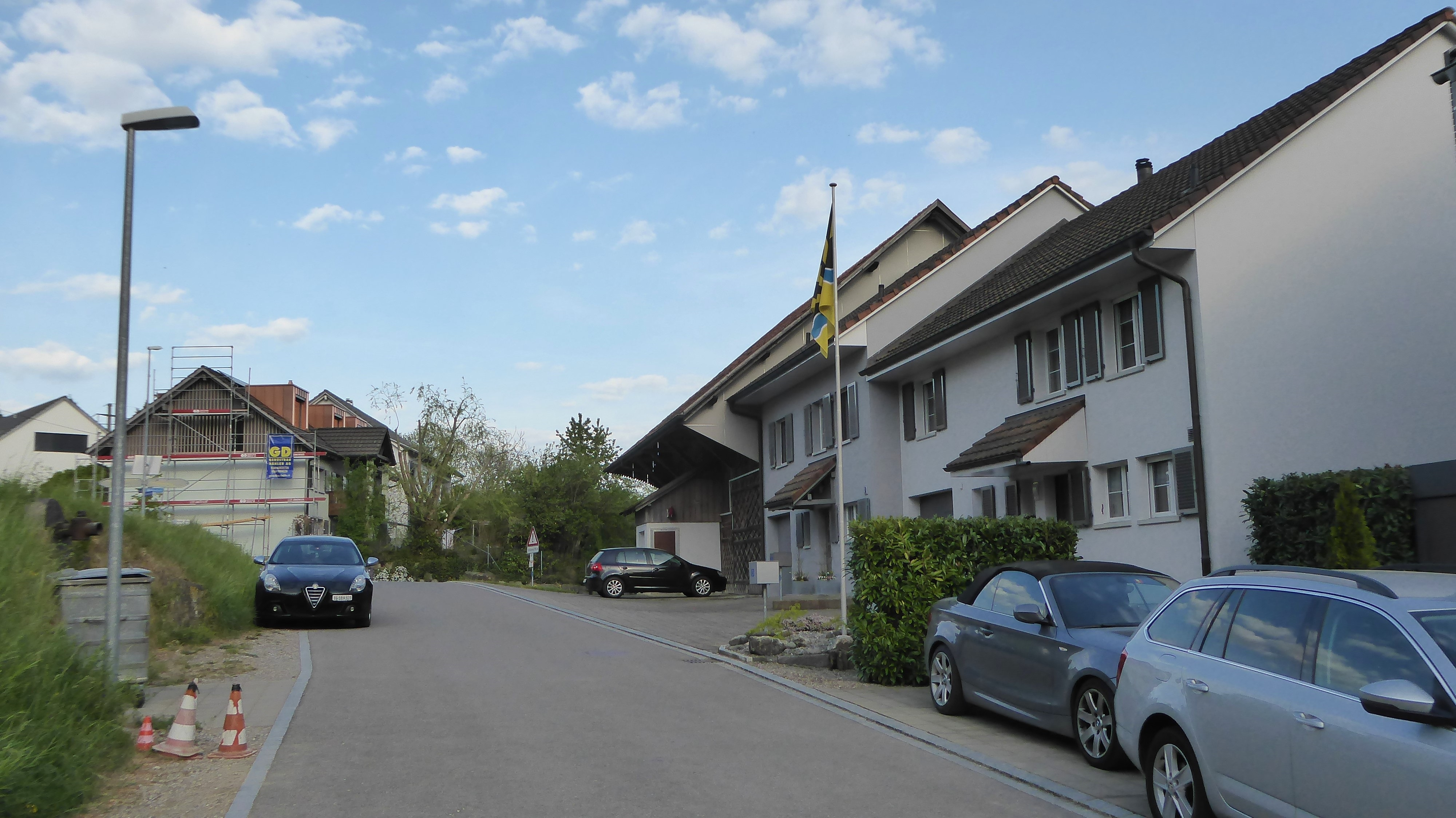 Lippoldswilen TG